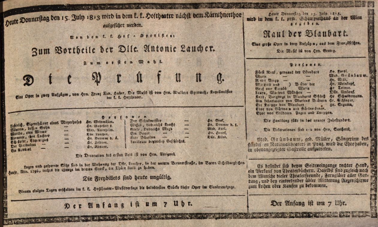 Theaterzettel der Hoftheater Wien vom 15. Juli 1813